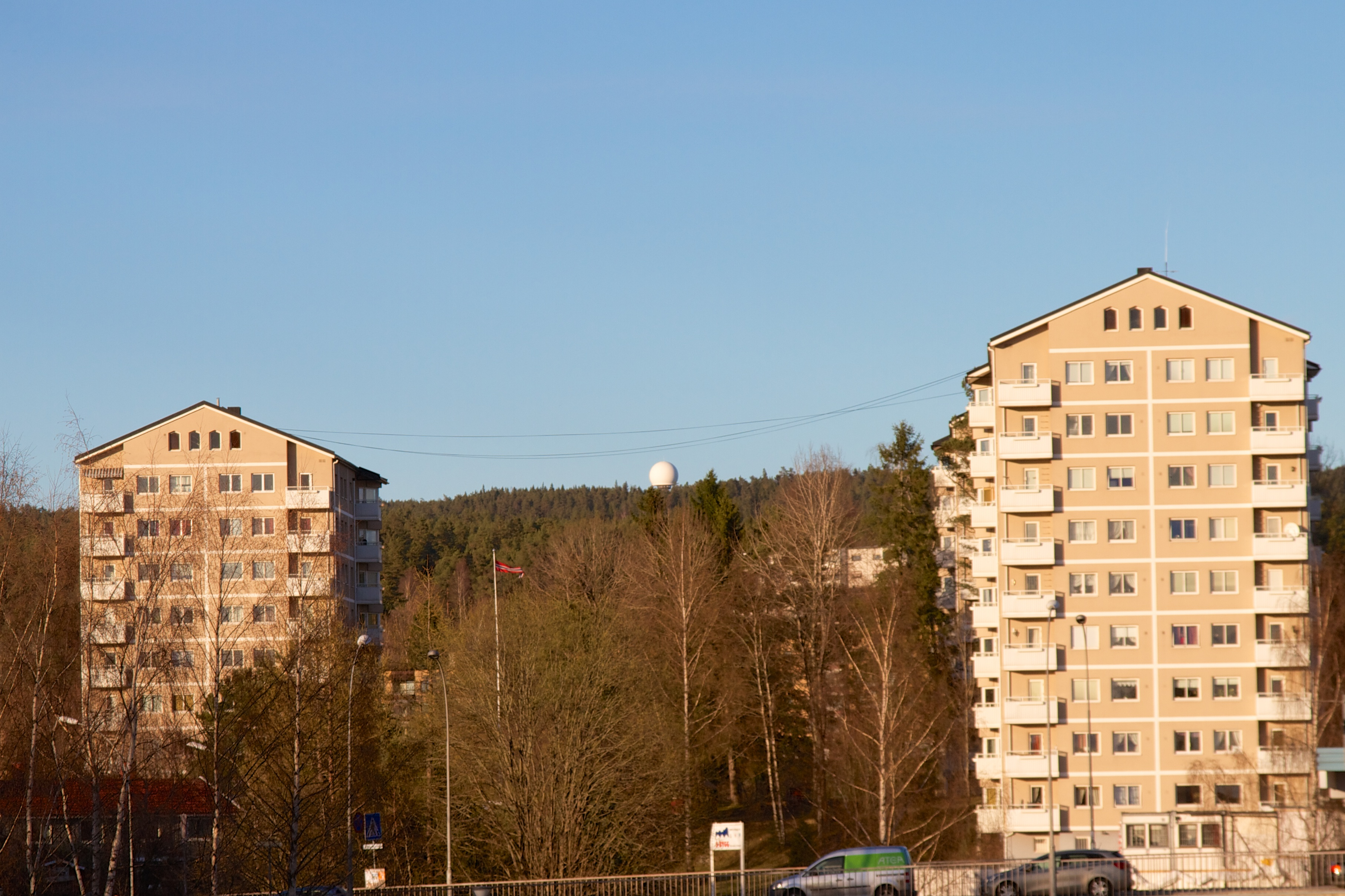 Bølerbakken på Bøler i Oslo.